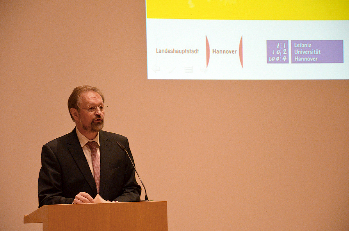 Zum Auftakt des4. Festivals der Philosophie unter dem Leitthema "Wie bitte geht Gerechtigkeit?" sprach Professor Klaus Hulek, Vizepräsident für Forschung der Leibniz Universität Hannover, im Schloss Herrenhausen ...